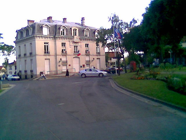 Hôtel de Ville de Villiers-sur-Marne (photo personnelle)